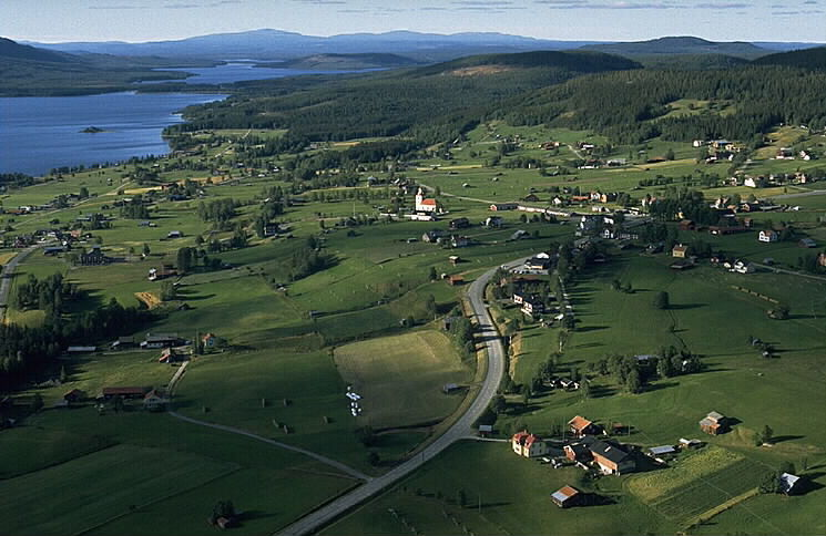 Klövsjö kyrka i bildens mitt. Motiv: Klövsjö Nyckelord: Flygbilder, Riksintressen Kategori: Jordbruksby Klövsjö kyrka i bildens mitt.